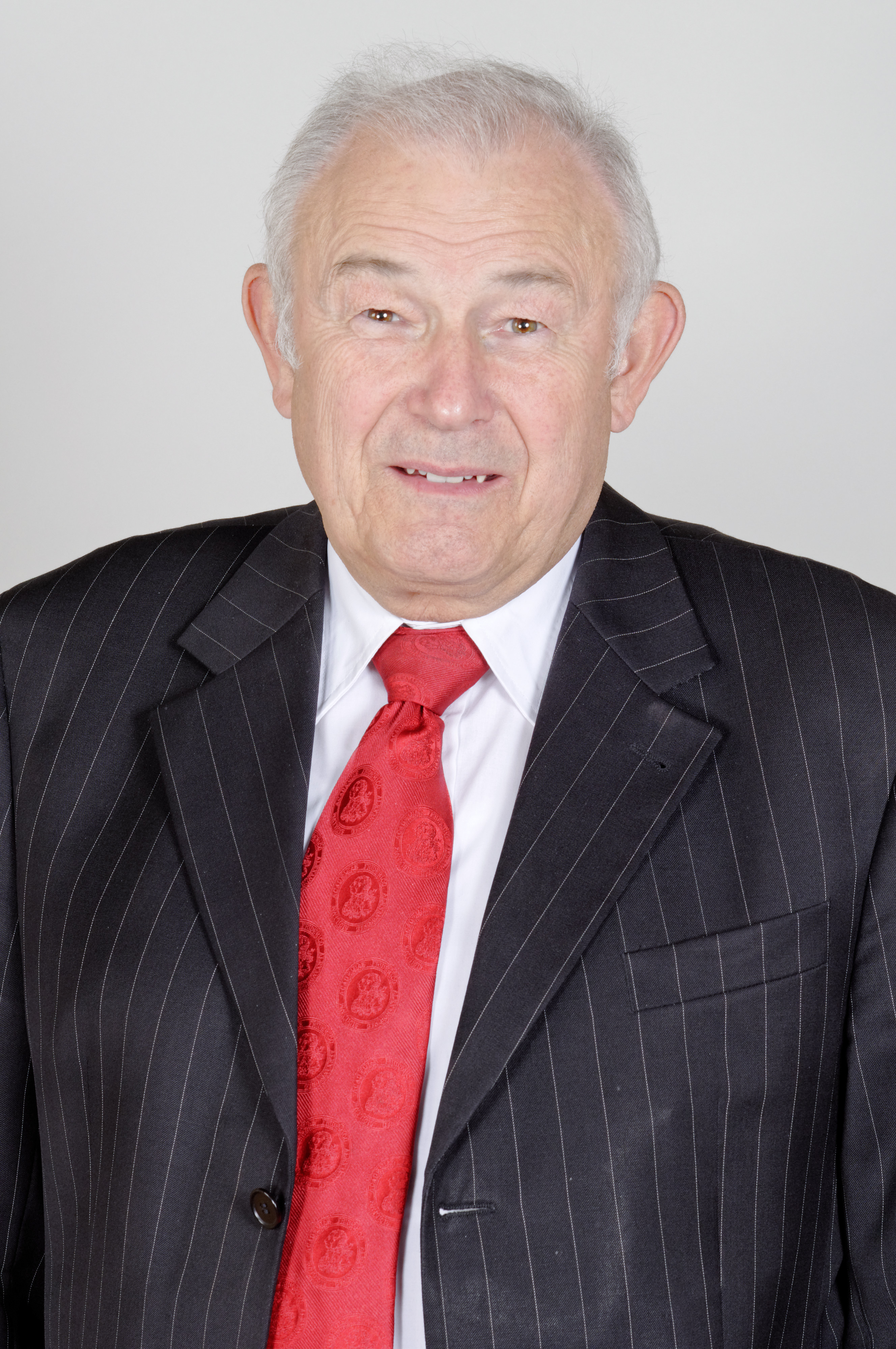 Landtagsprojekt Bayern